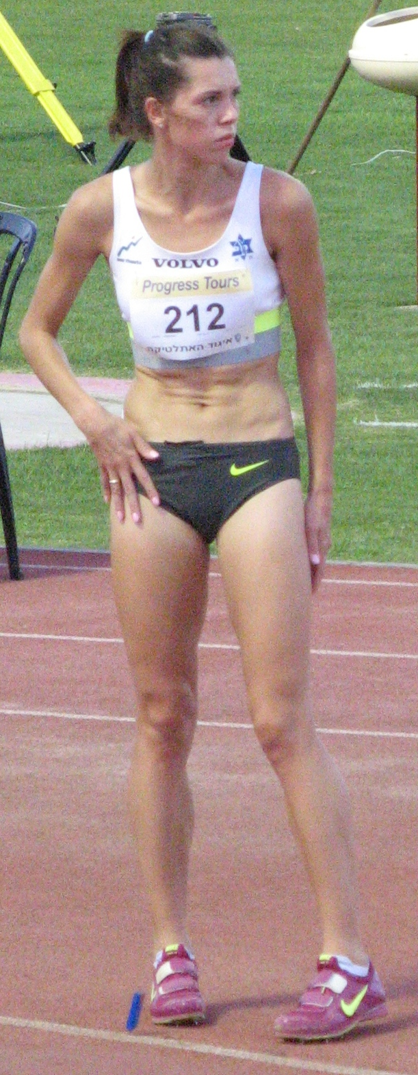 קופצת המשולשת האוקראינית הישראלית חנה קנייזבה-מיננקו במהלך היום הראשון של אליפות ישראל באתלטיקה קלה לשנת 2015.